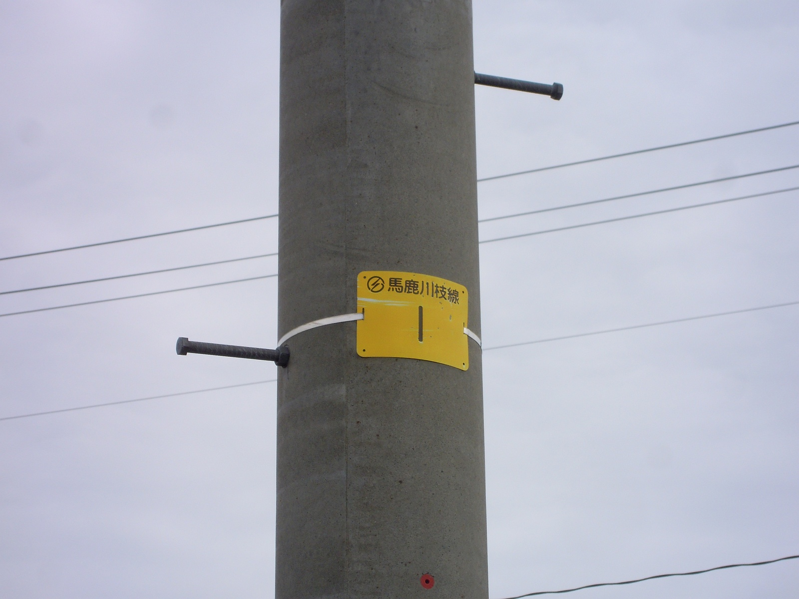 青森県北津軽郡中泊町にある東北電力馬鹿川枝線の電柱に付けられている銘板